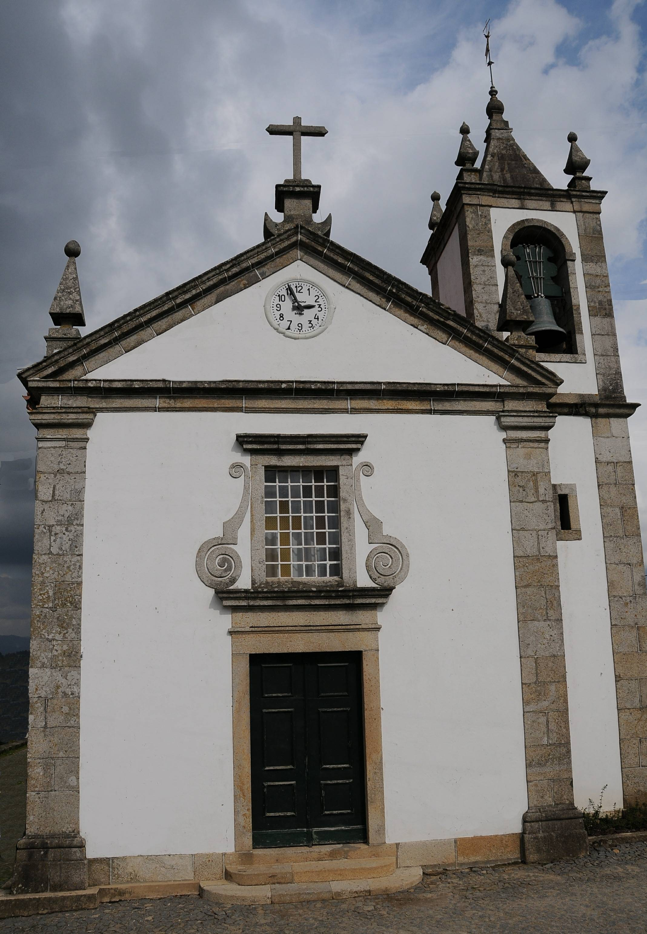 Padim da Graca Church, in Braga, Portugal